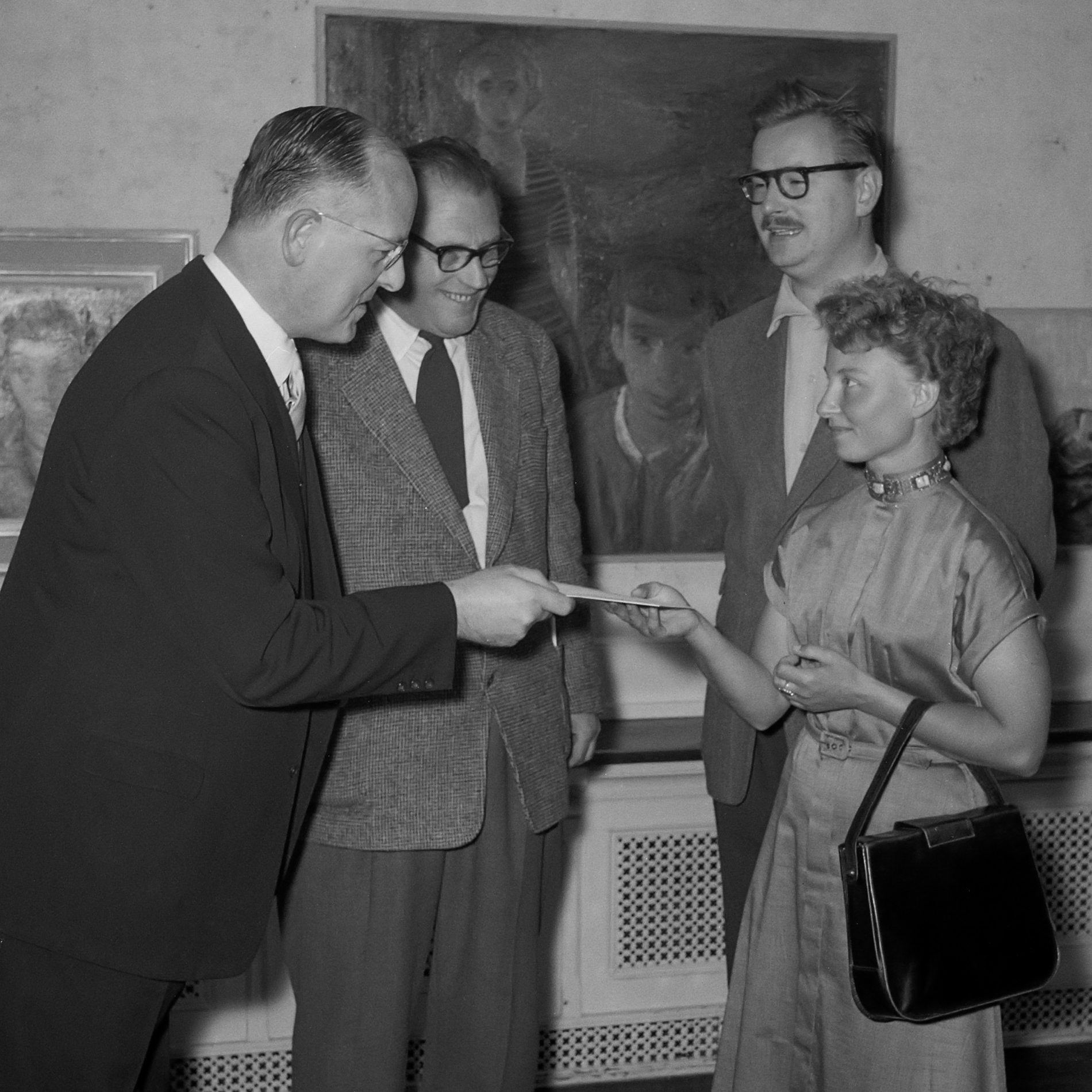 Uitreiking J. Marisprijs Den Haag , Co Westerik , burgemeester Schokking , W. Hussen , Jeny Dalenoord 30 juli 1955